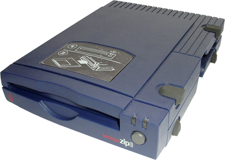 Motiv: Externes Speicherlaufwerk vom Typ zip 100 der Firma iomega. Mit diesem Speicherlaufwerk können bis zu 100 MB unkomprimierte Daten auf einer zip-Disk gespeichert werden. Mit dem Nachfolgemodell dieses Gerätes können bis zu 250 MB auf einer zip-Disk gespeichert werden. Die Abmessungen des Laufwerks betragen ca. 136 mm × 181 mm × 39 mm. Das Gerät kann über eine SCSI-Schnittstelle an einen Computer angeschlossen werden. Es verfügt über einen Schalter um zwischen den SCSI-ID's 5 und 6 zu wählen, sowie einen Schalter um die SCSI-Kette bei Bedarf zu terminieren. Aufnahmedatum: 2004-06-26 Aufnahmeort: Studio Bildname: Iomega_zip-100-Laufwerk_01_KMJ.jpg Bildgröße: 768 Pixel x 549 Pixel (58.255 Bytes) Stichworte: EDV, Datenspeicherung, Festplatte, Diskette, SCSI, extern, iomega, zip